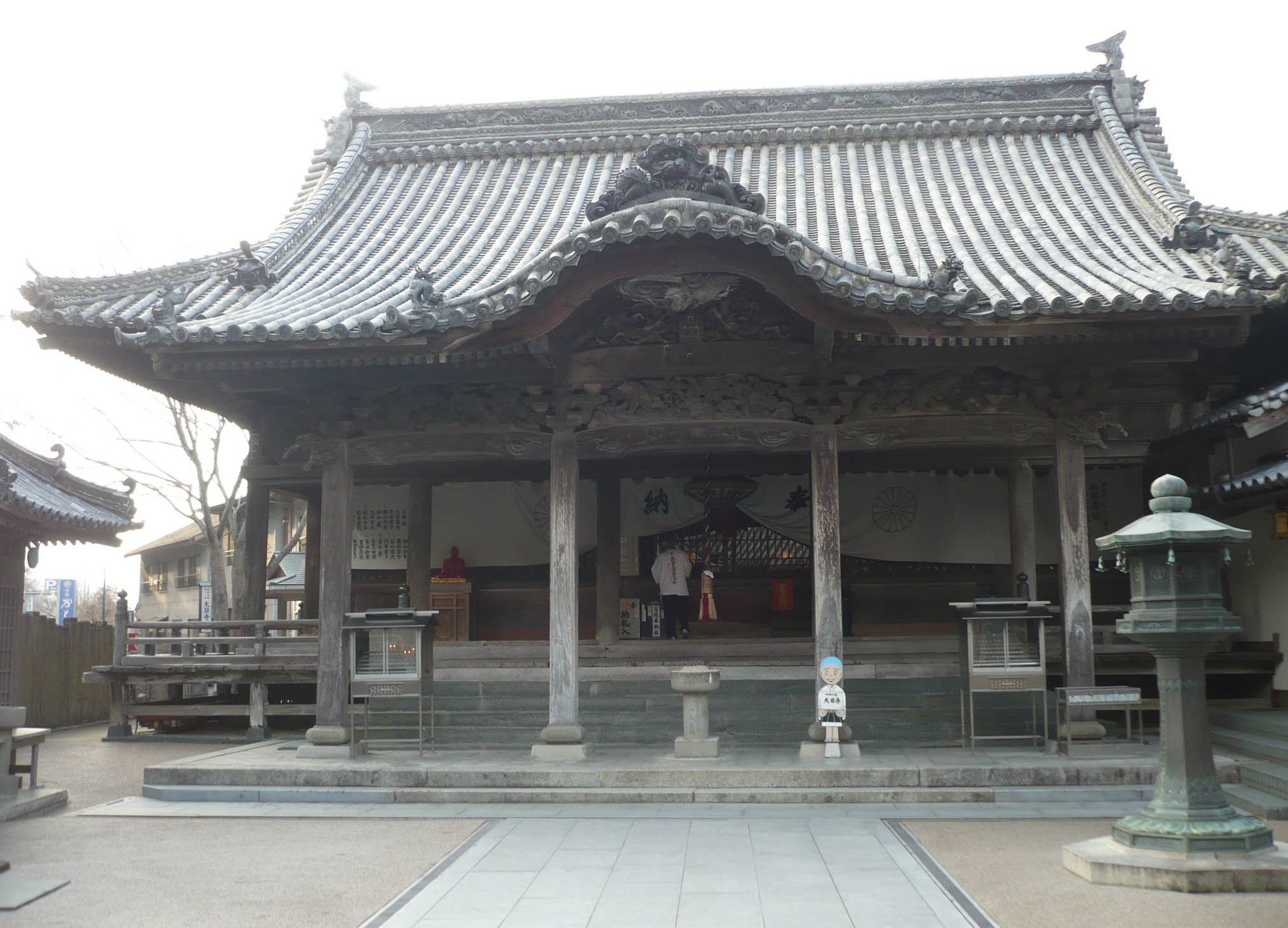 本堂